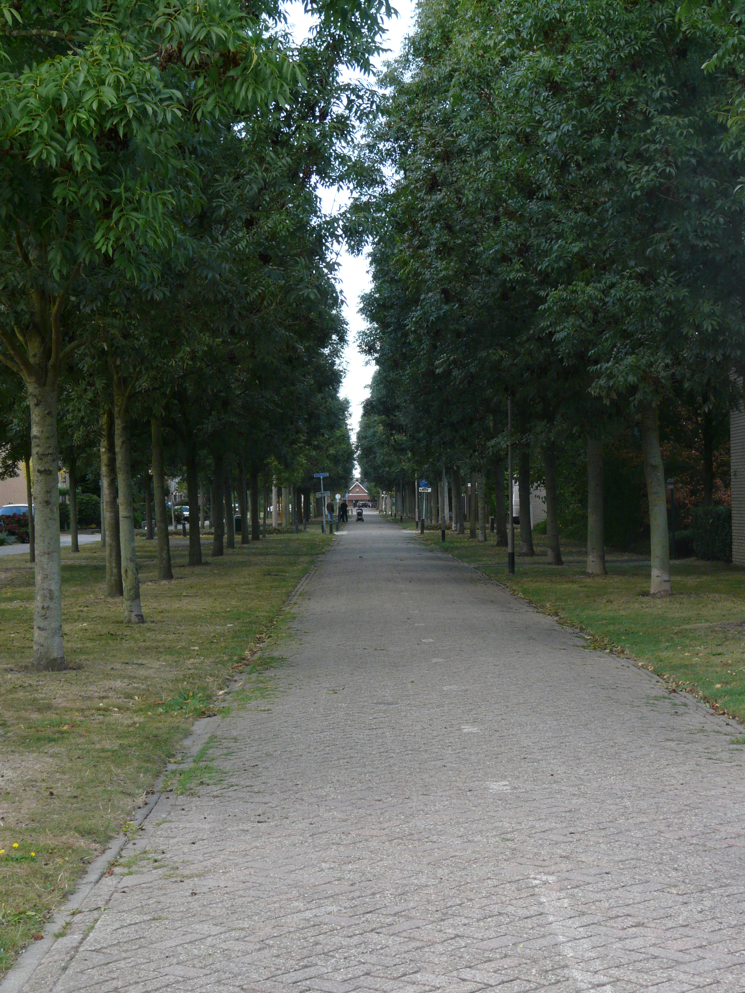 Zicht op een deel van de straat de Rietdijk in de wijk de Asterd in het grote stadsdeel de Haagse Beemden in het noorden van Breda